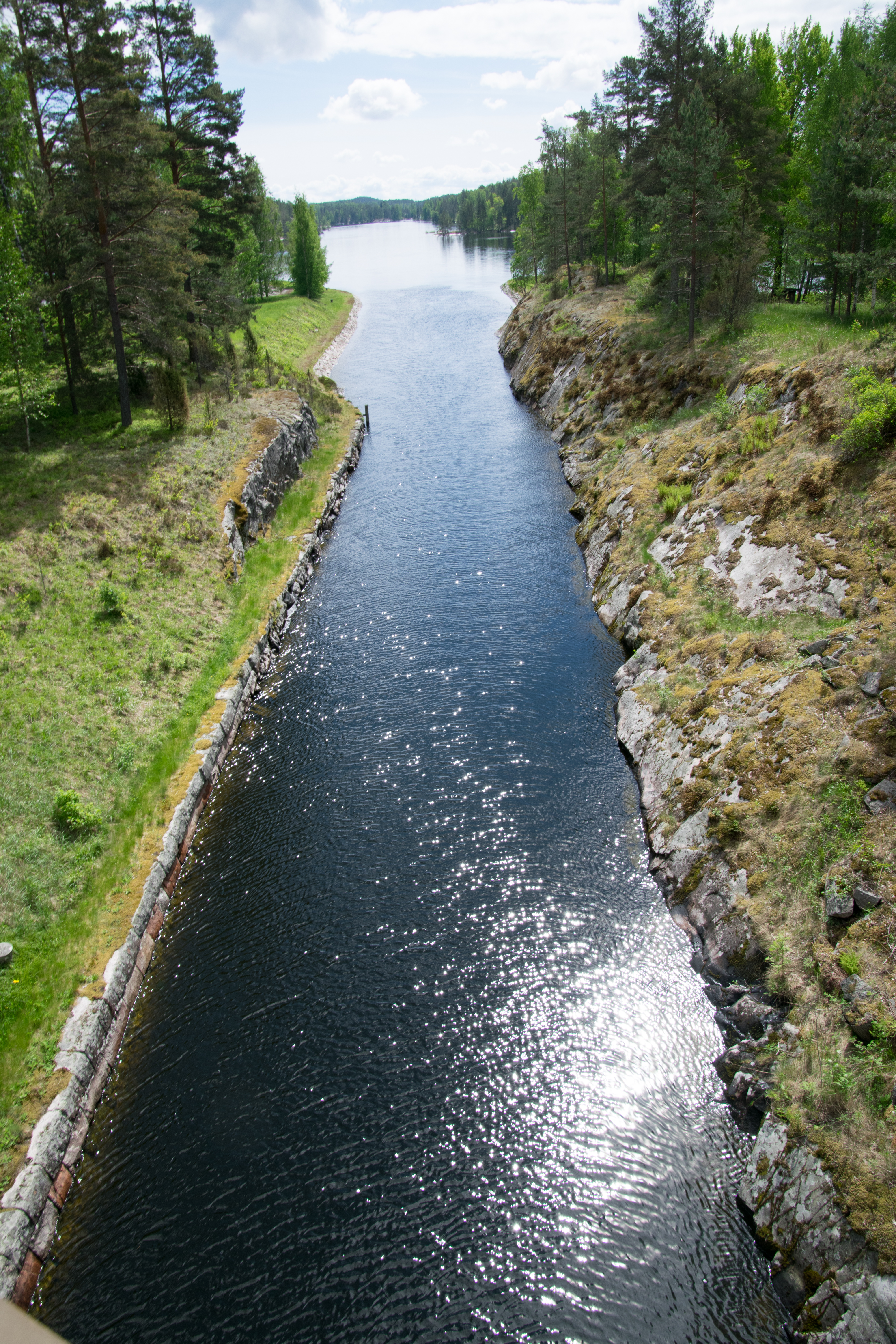 Varkaantaipaleen kanava